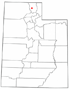 Localización de Millville, Utah